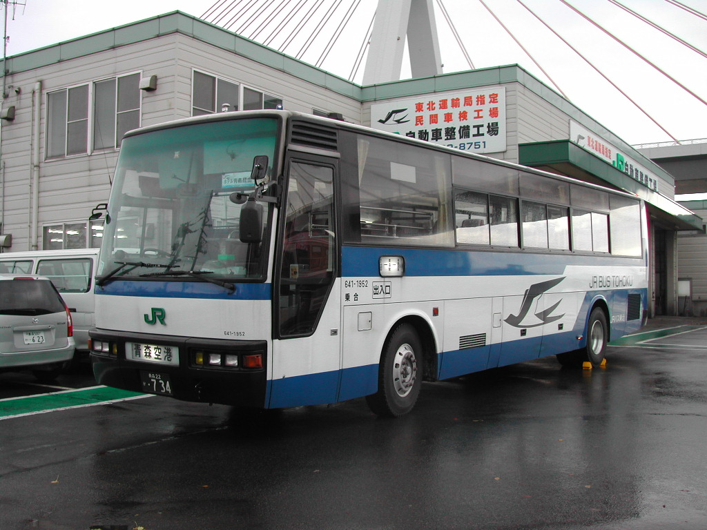 青森支店にて、2002-11-3撮影